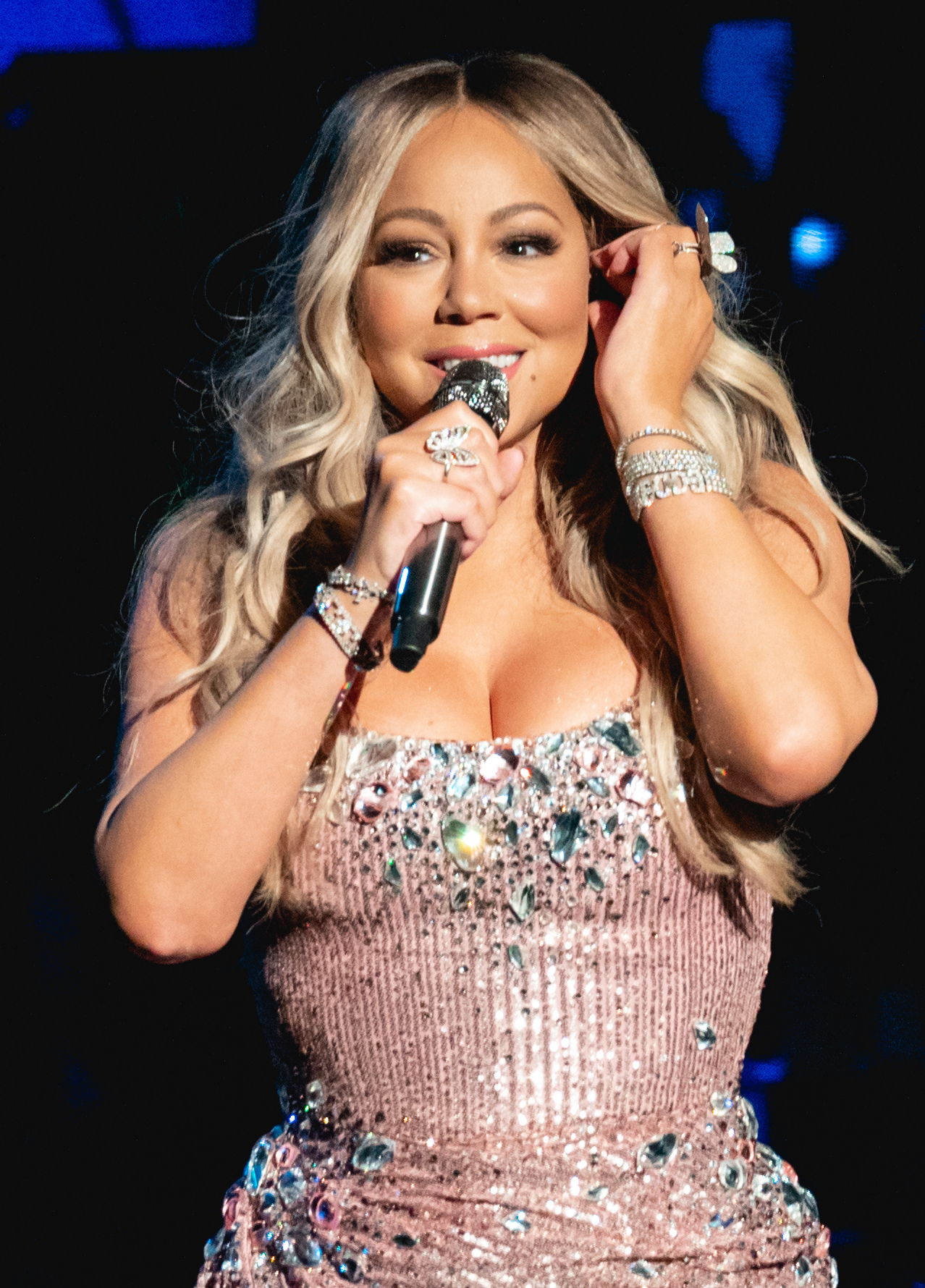 MariahRAH270519-9